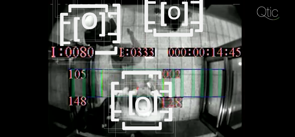 SRT Aufnahmebeispiel mit Mustererkennung (schematische Erfassungsunterteilung, prozessintern deutlich feiner)